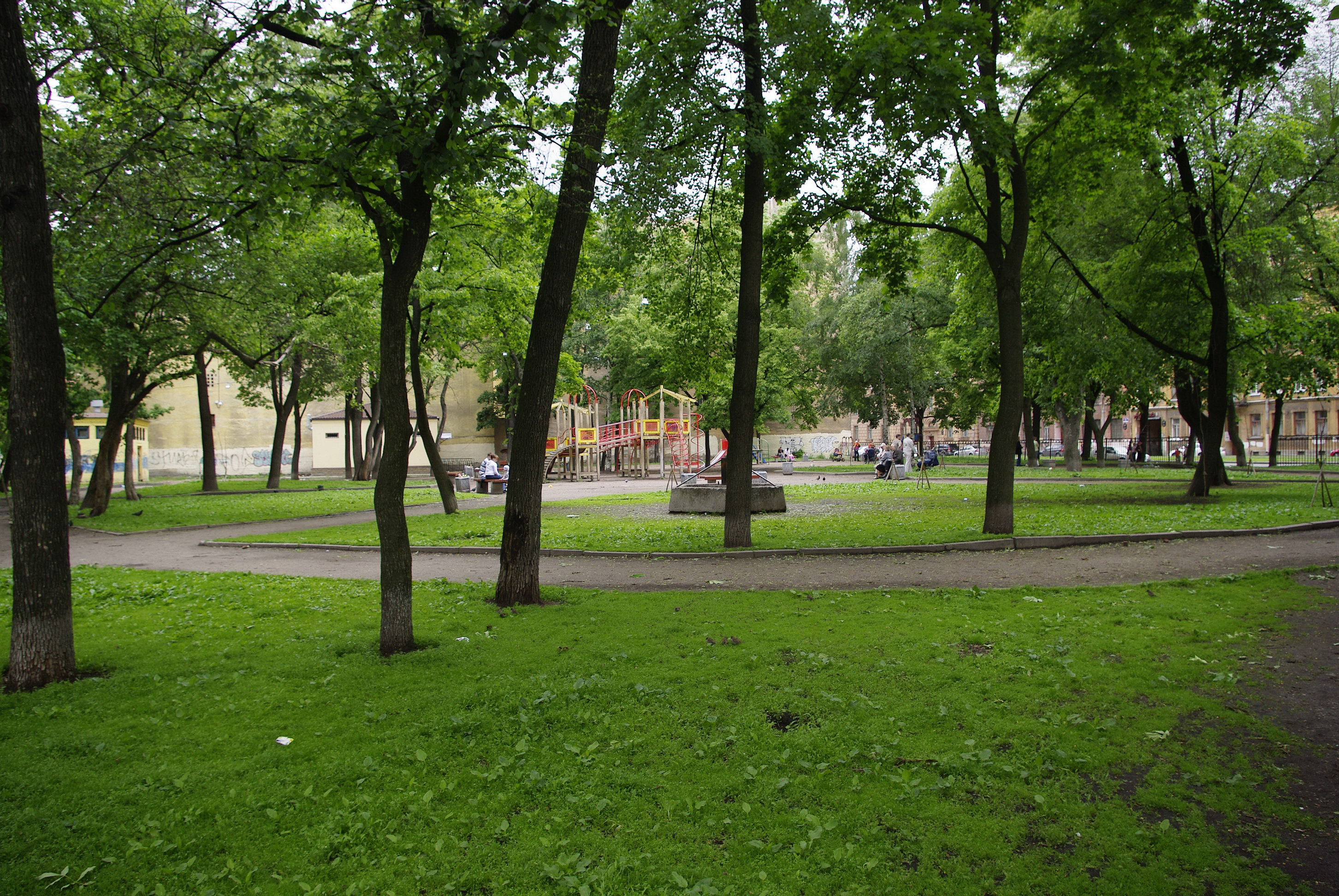 Сад имени Веры Слуцкой на Васильевском острове Санкт-Петербурга (Российская Федерация), между чётной стороной Донской улицы и 15-й линией.